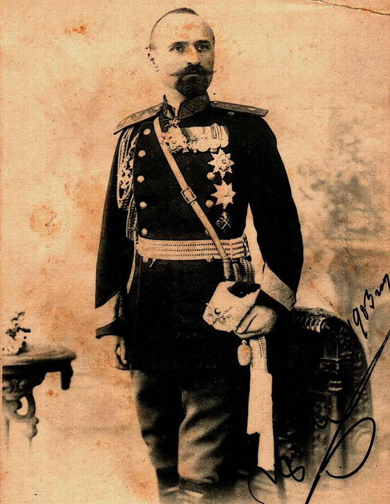 Български Иван Цончев (1858-1910), Генерал и революционер, войвода на Върховния македонски комитет, основен организатор на Горноджумайското и участник в Илинденското въстание Deutsch Iwan Zontschew (1858-1910), bulgarischer Militär, General und Freiheitskämpfer